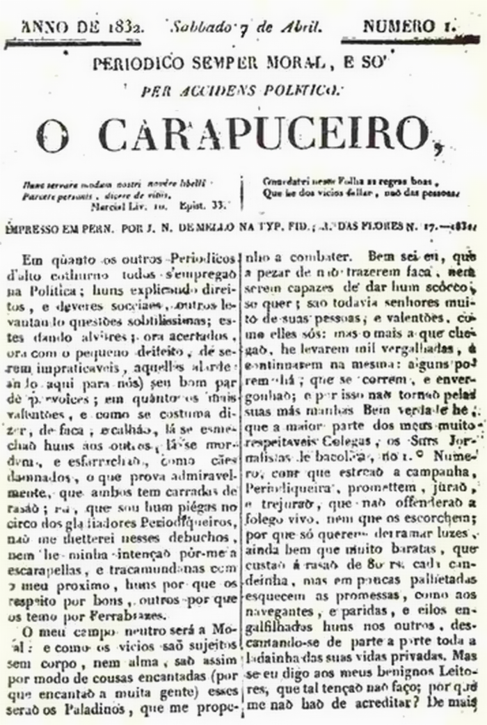 Primeira página do número 1 de O Carapuceiro, jornal crítico de Recife, Pernambuco, Brasil, que circulou de 1832 a 1842